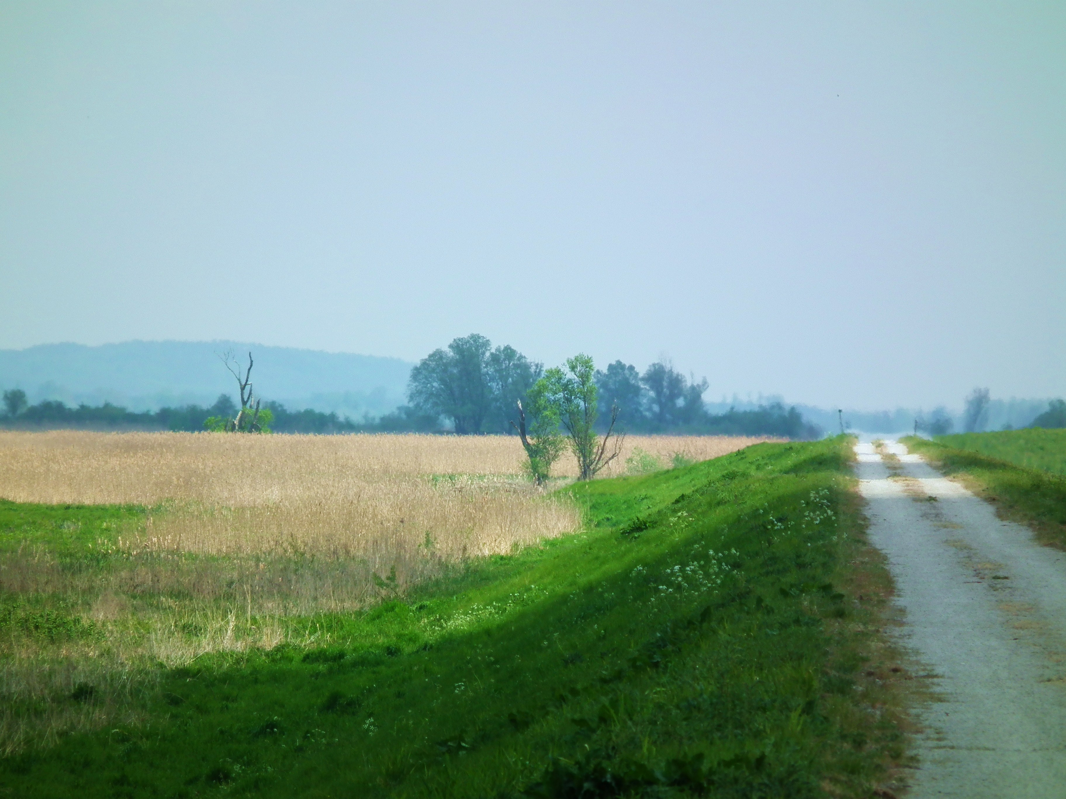 PN Ujście Warty, polder płn. Wały warciańskie.